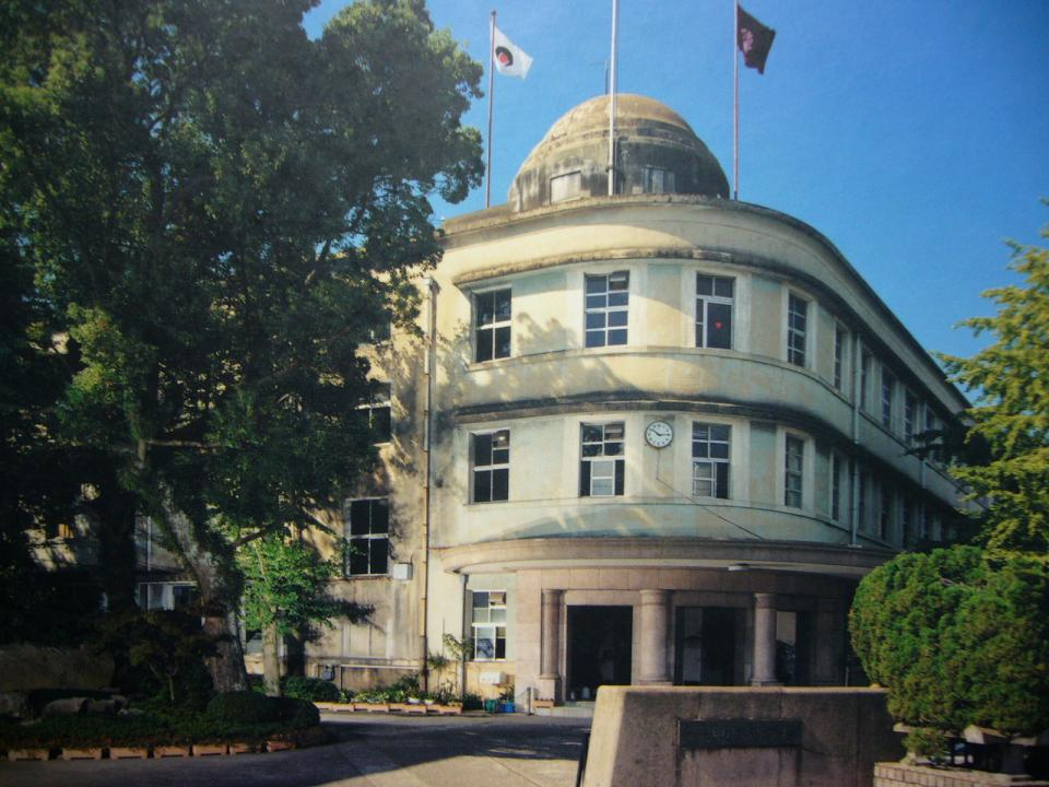 旧塗装の本館